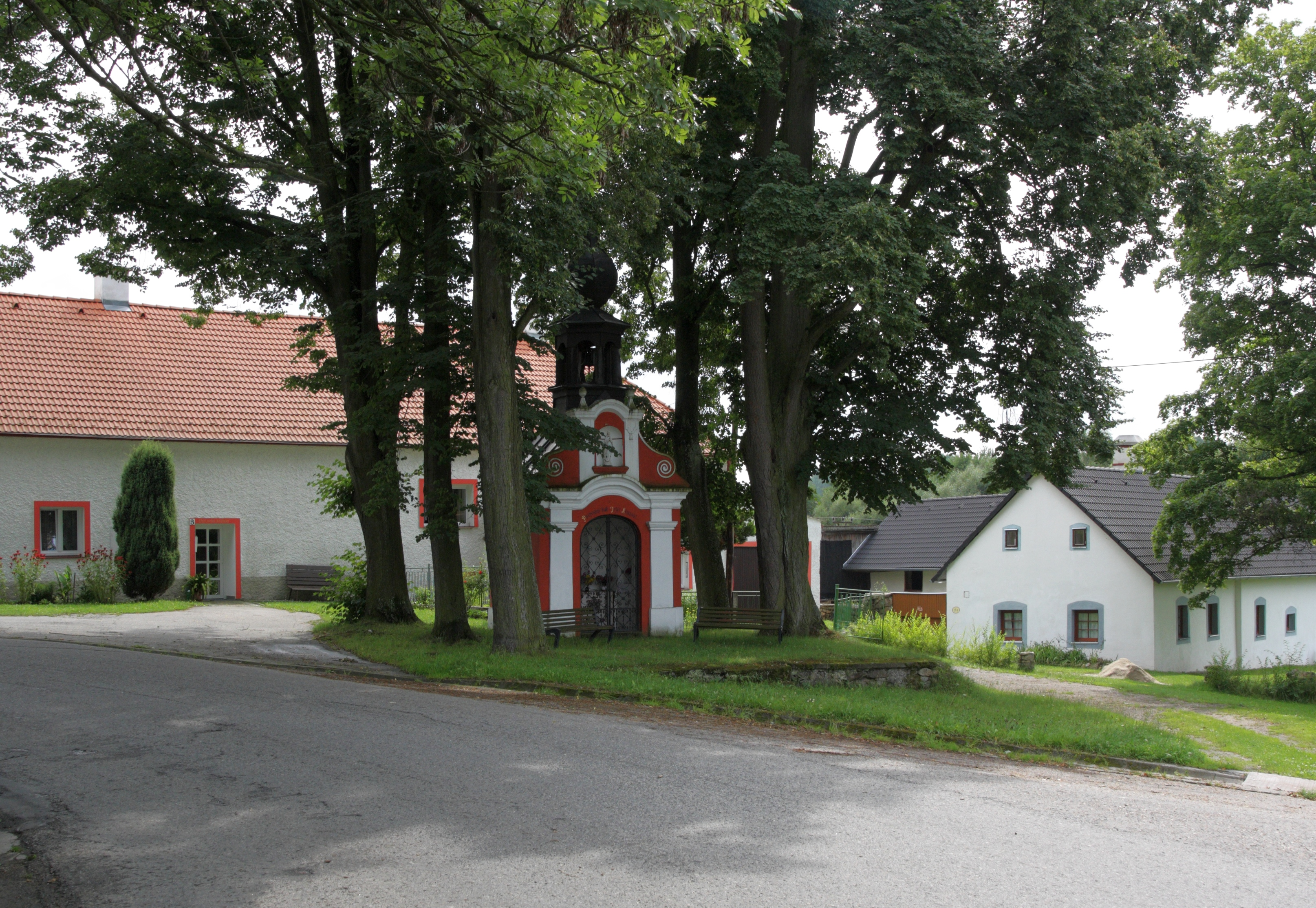 Svébohy - střed vsi s kaplí.